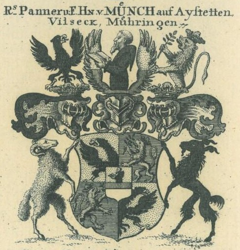 Bei der Erhebung in den Reichsfreiherrenstand am 7. November 1788 vermehrtes Wappen der der Freiherren von Münch